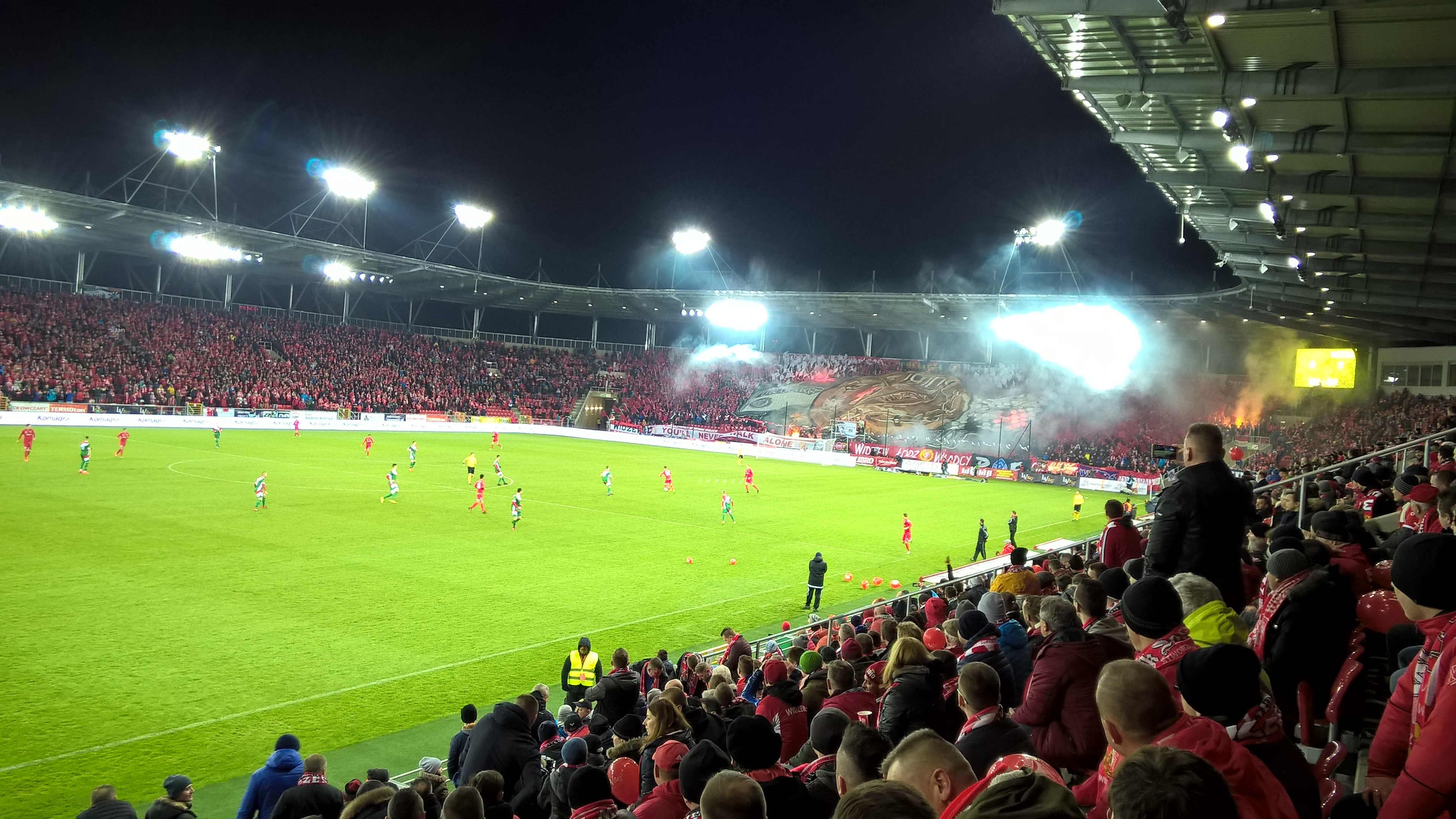 Otwarcie stadionu Widzewa - 18.03.2017